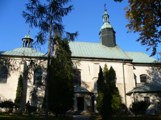 Koniusza - rzymskokatolicki kościół parafialny p.w. śś. Piotra i Pawła (zabytek nr A-318/M i A-373)